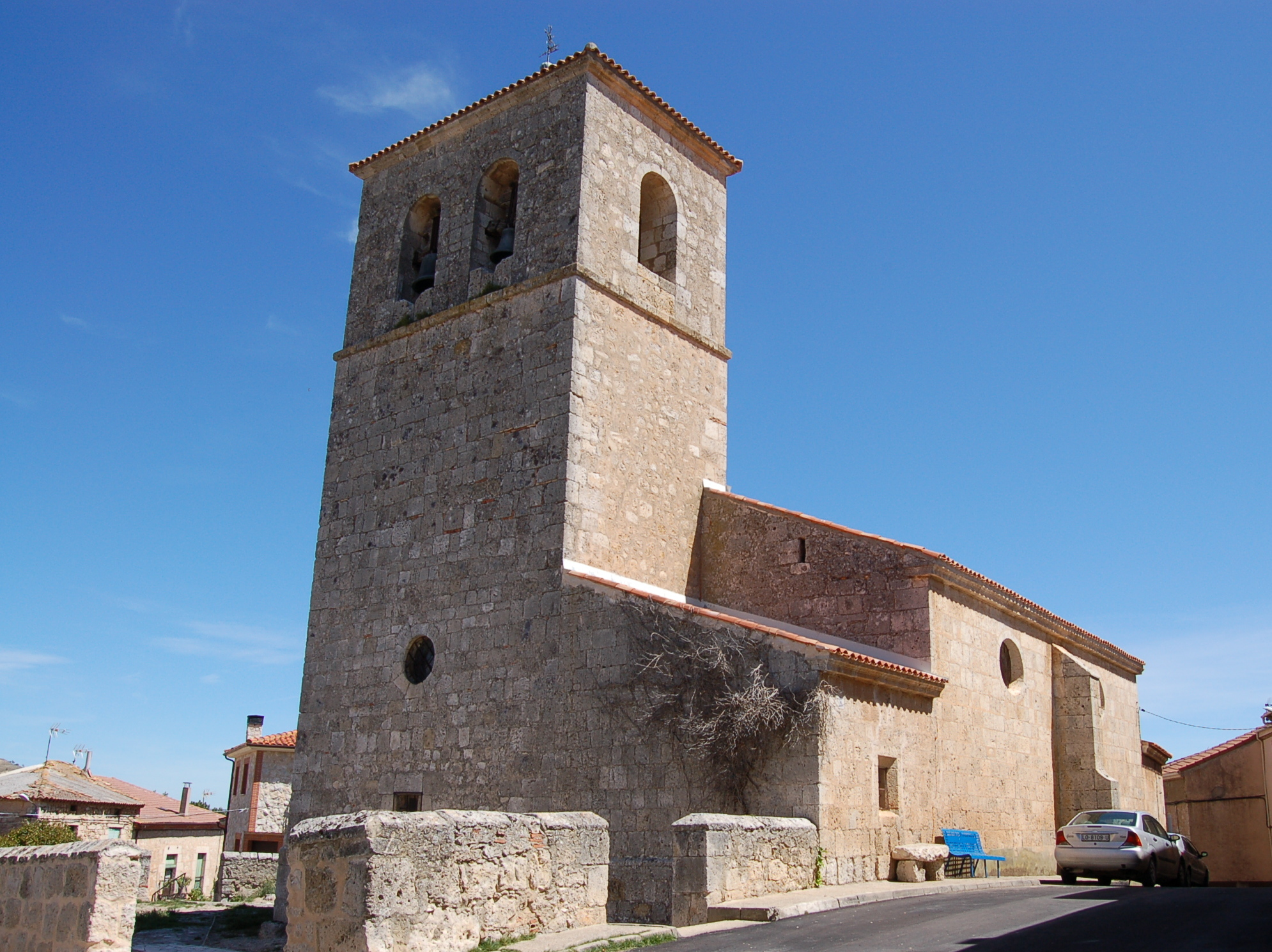 Igrexa de Mambrilla de Castrejón